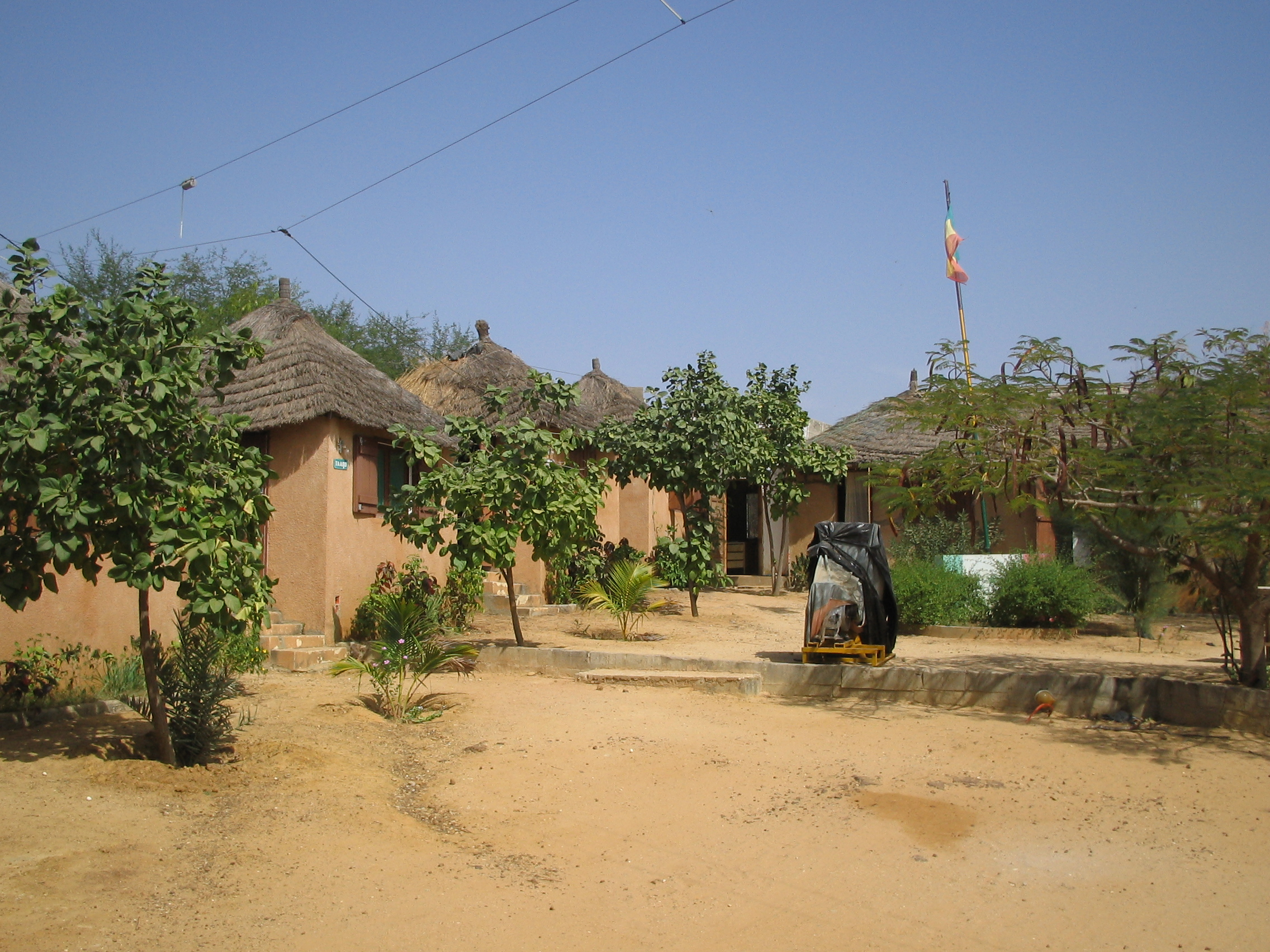 Campement Kër Cupaam à Popenguine, Sénégal